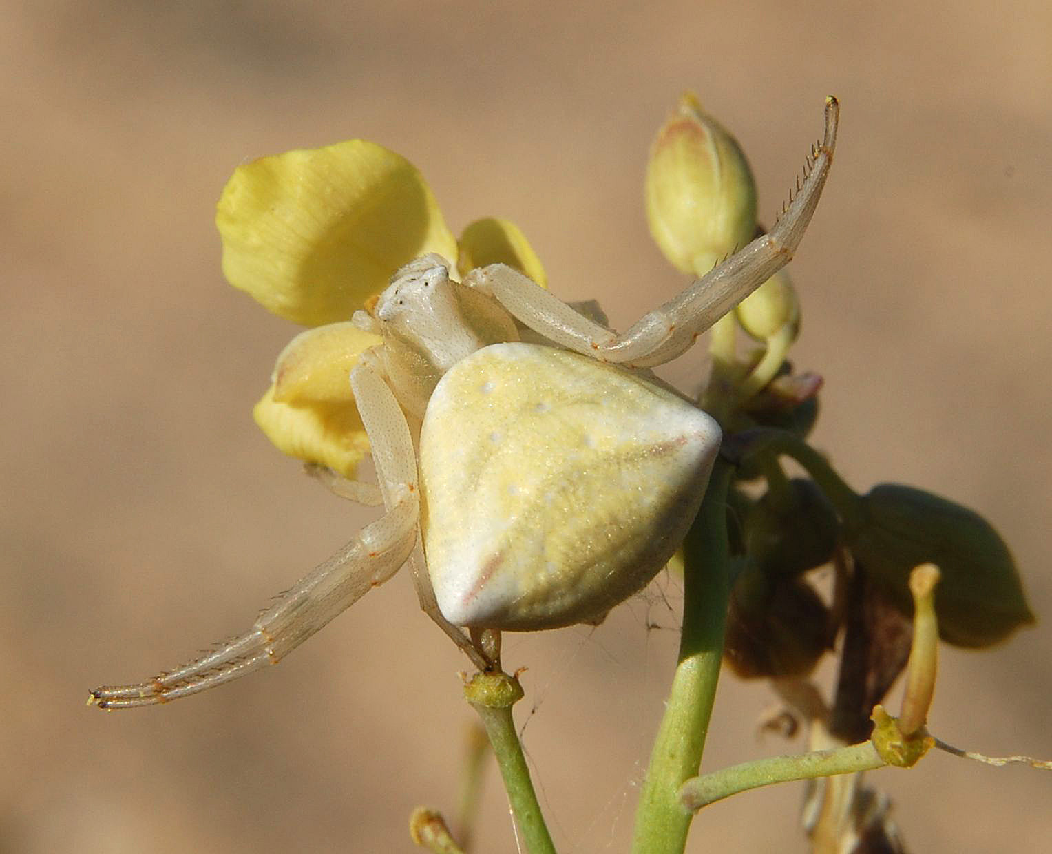 Thomisus onustus, Weibchen. Brache in Berlin-Mitte, Deutschland